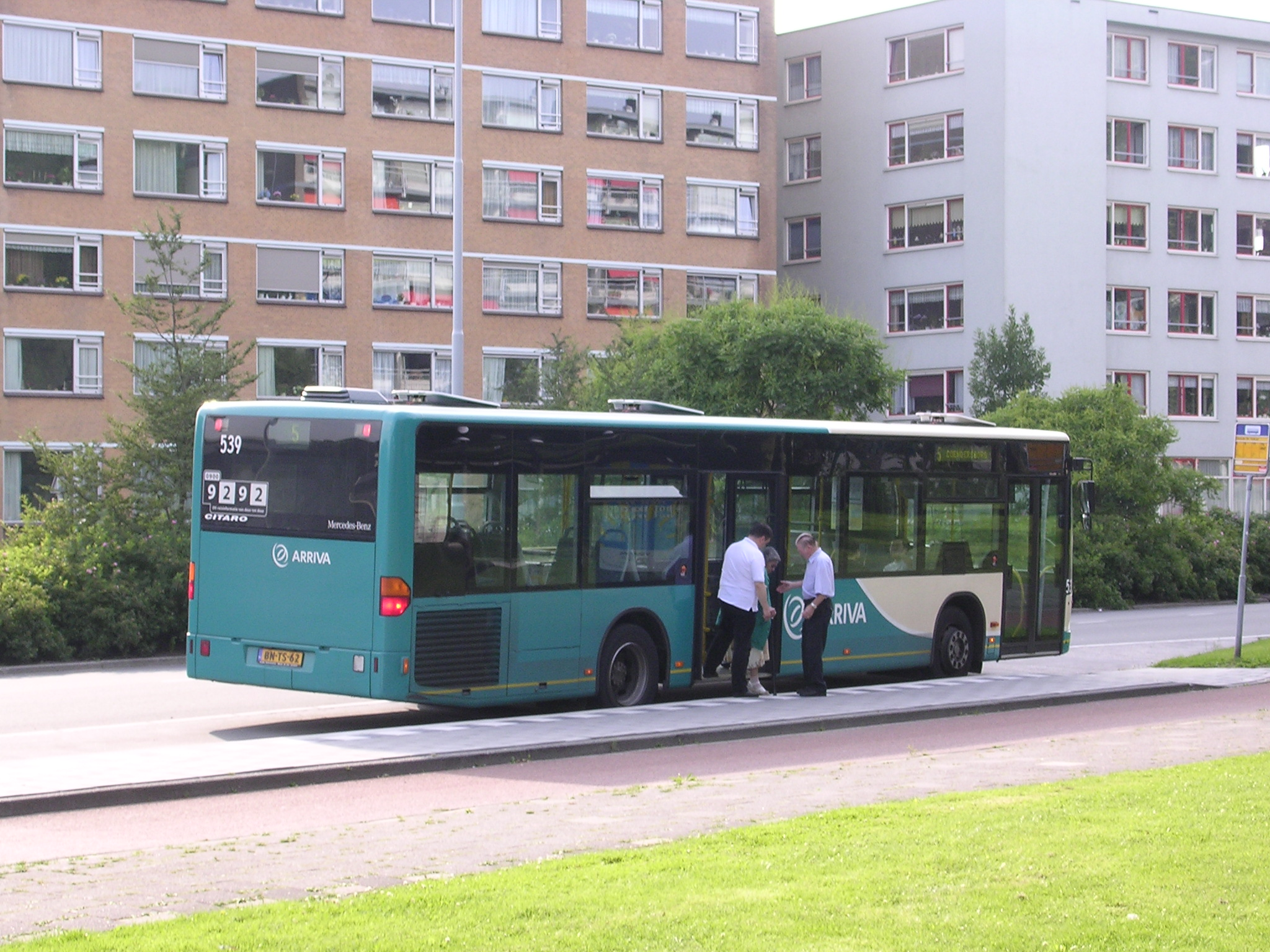 Een oudere passagier stapt met hulp uit Citaro nummer 539 van Arriva te Groningen (Zonnelaan).